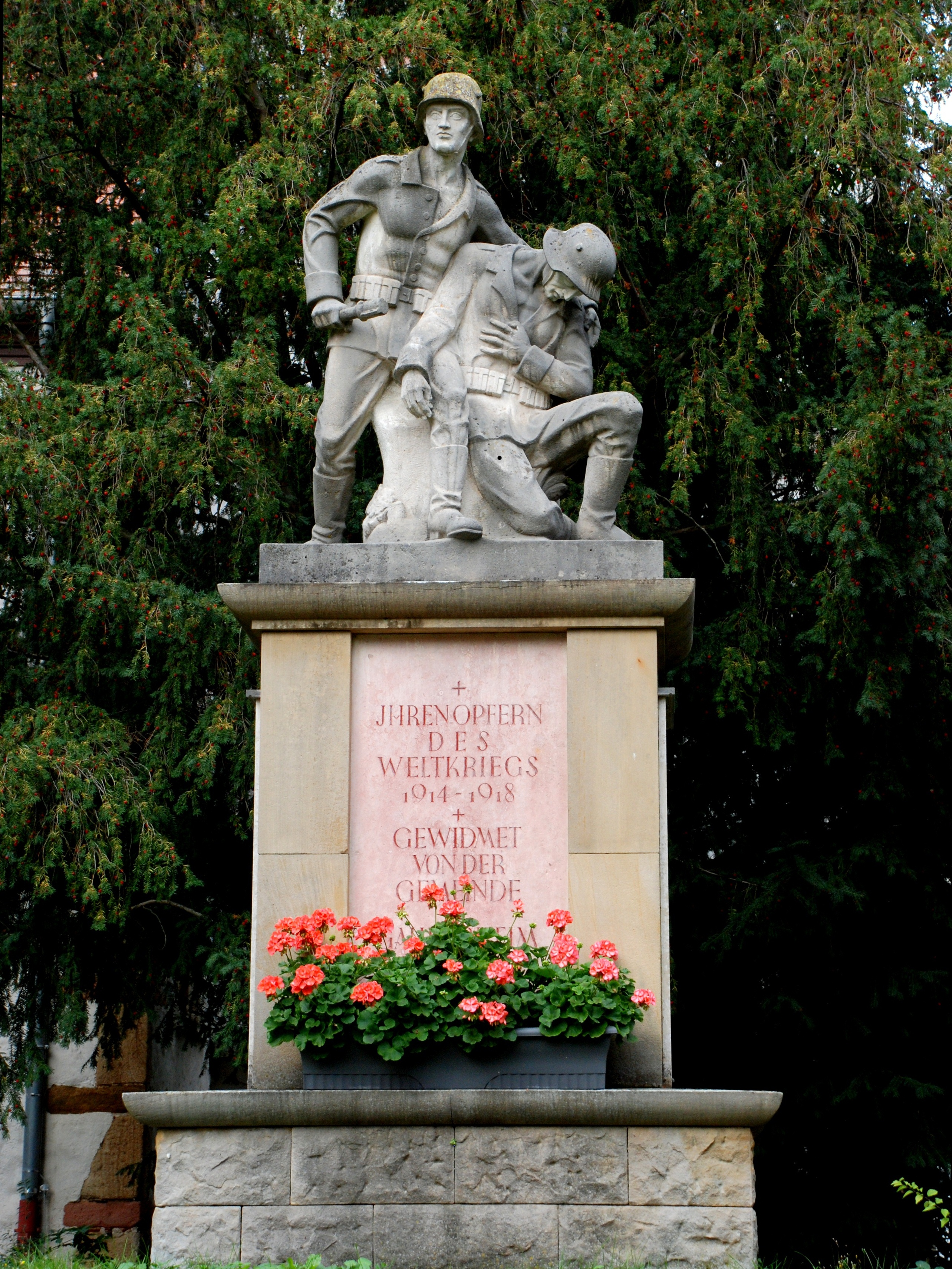 Kriegerdenkmal in Gauersheim, Donnersbergkreis, Rheinland-Pfalz, Deutschland.